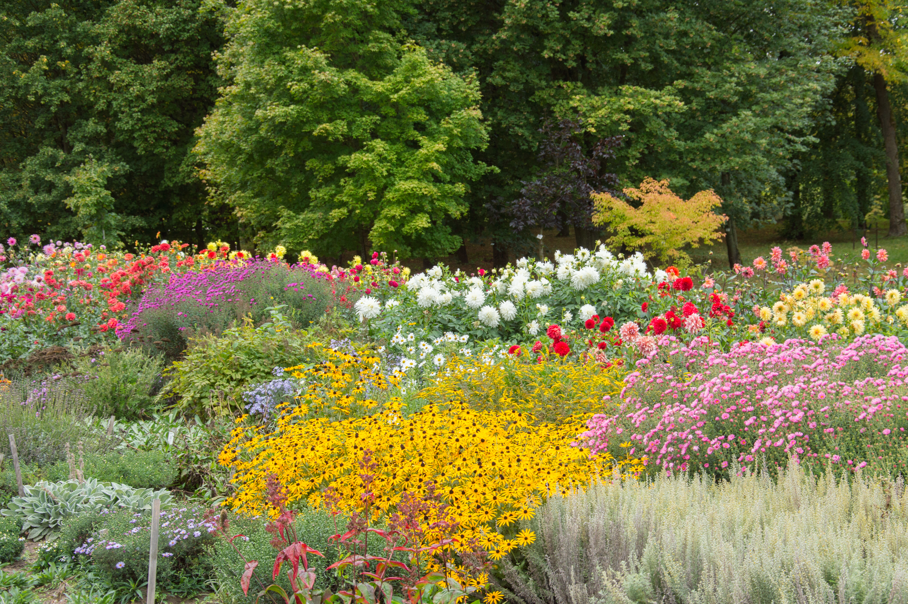 Dekoratyviųjų augalų ekspozicija VDU Botanikos sode Exposition of ornamental plants at VMU Botanical in Kaunas